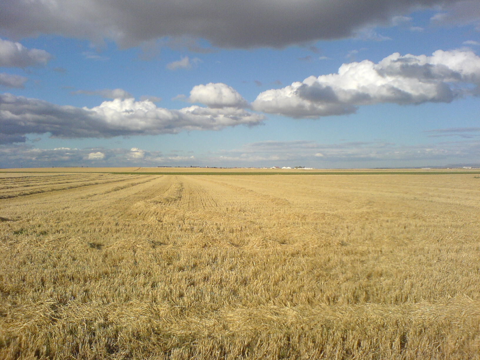 Campaspero desde cerca de Minguela.